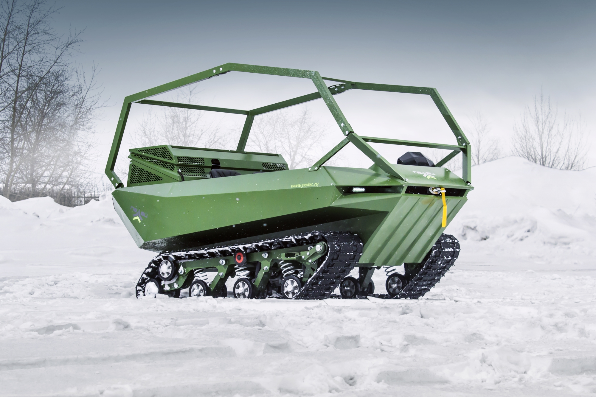 Легкий гусеничный вездеход "Пелец Круизер III". Мощность - 30 л.с., вес - 620 кг.